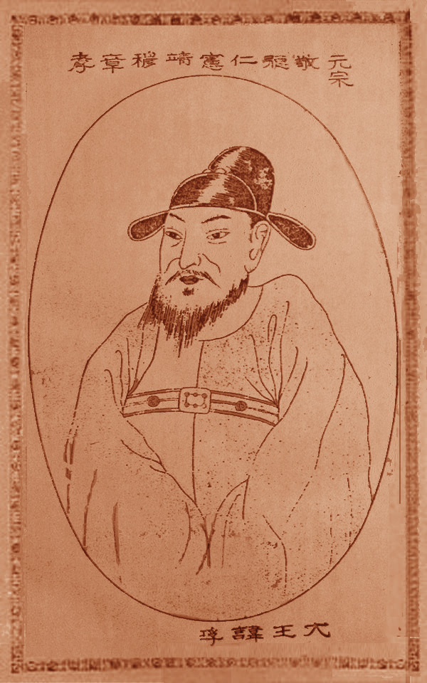 조선 원종의 어진